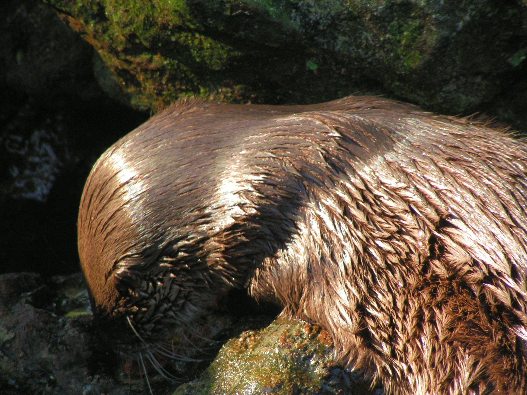 Lobito de río (Lontra longicaudis)